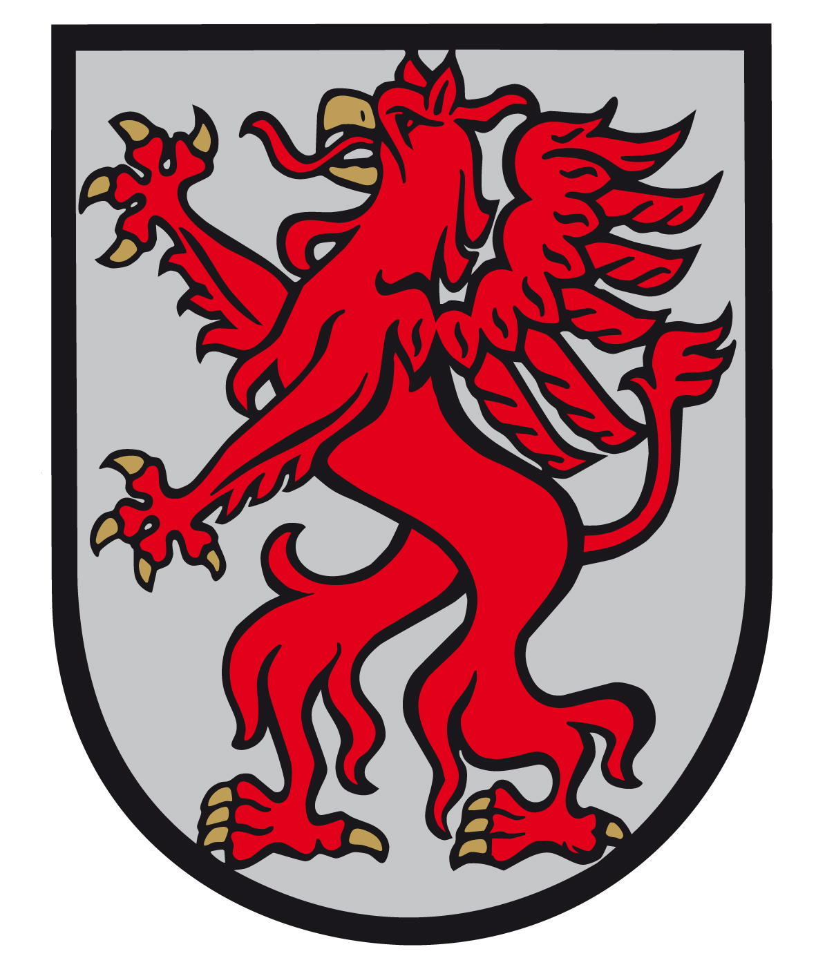 Das Stadtwappen wurde der Gemeinde Leonding am 27. Jänner 1969 von der OÖ Landesregierung verliehen.